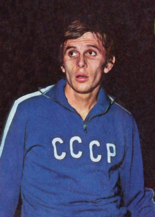 CAMPIONI dello SPORT 1973/74-Figurina n.50- ARZHANOV - URSS -ATL.LEGGERA-Rec